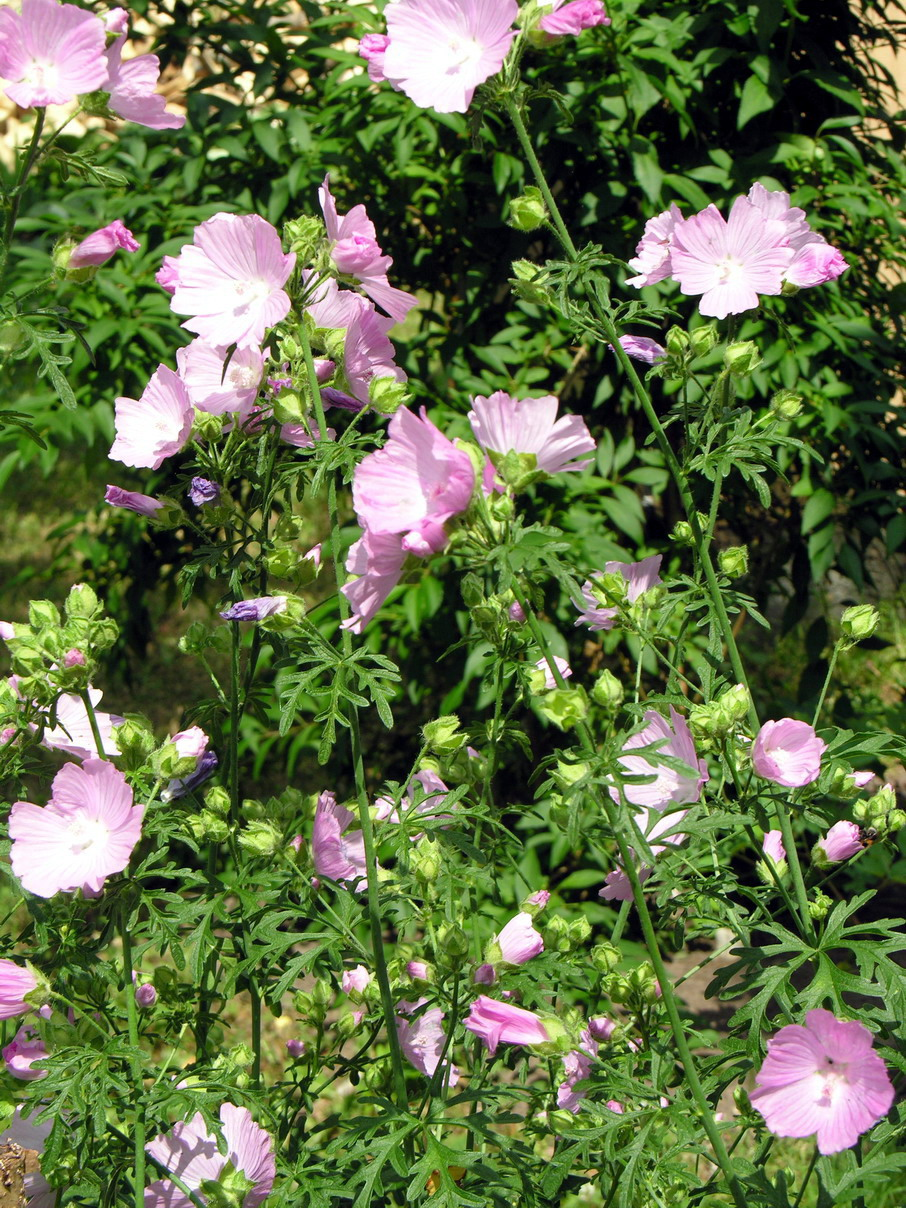 Aukštoji dedešva (Malva alcea) Šeima. Dedešviniai (Malvaceae) Foto: Algirdas, 2006 m. liepos 16 d., Lietuva